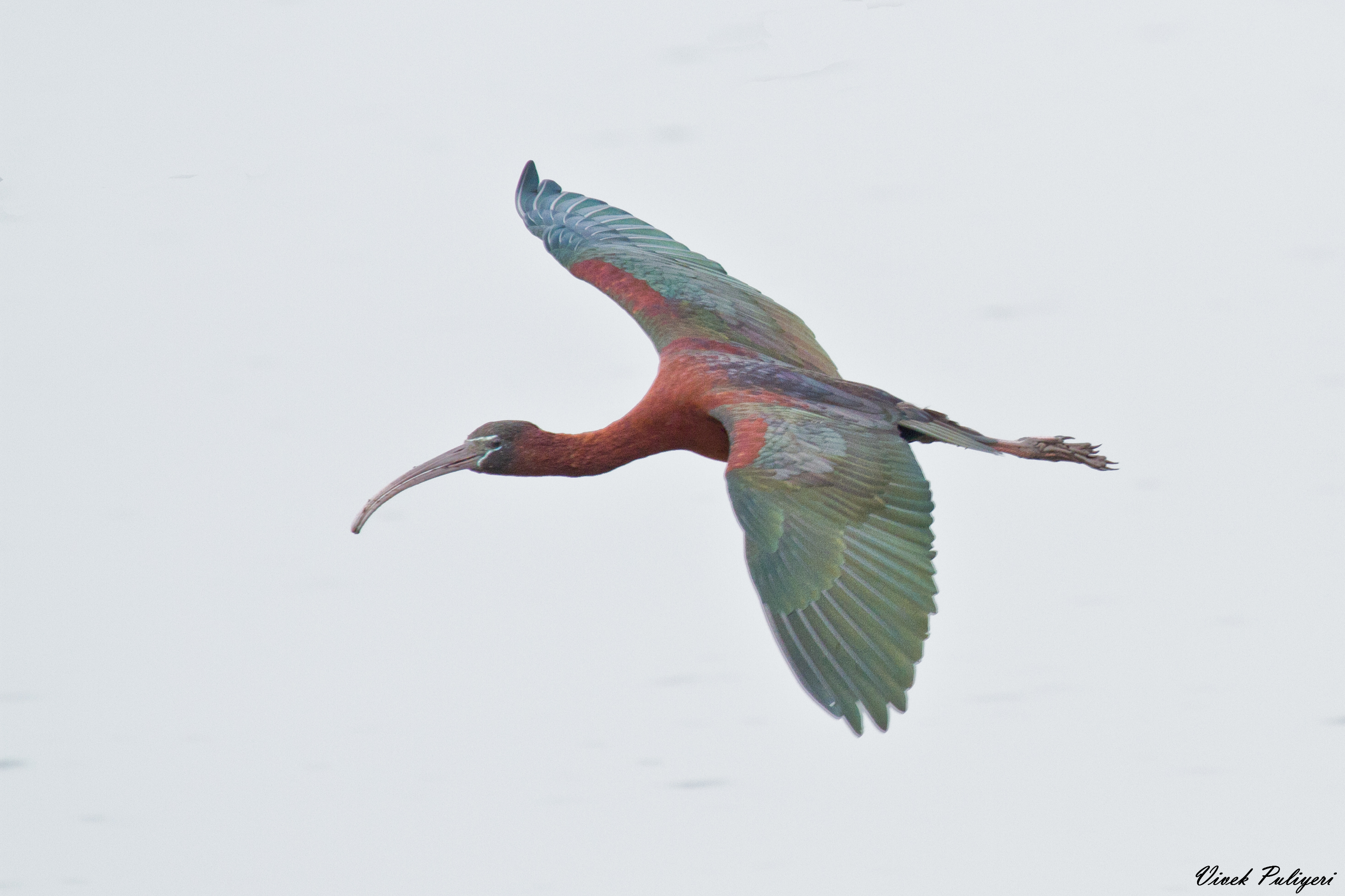 Glossy Ibis @ Pallikkaranai